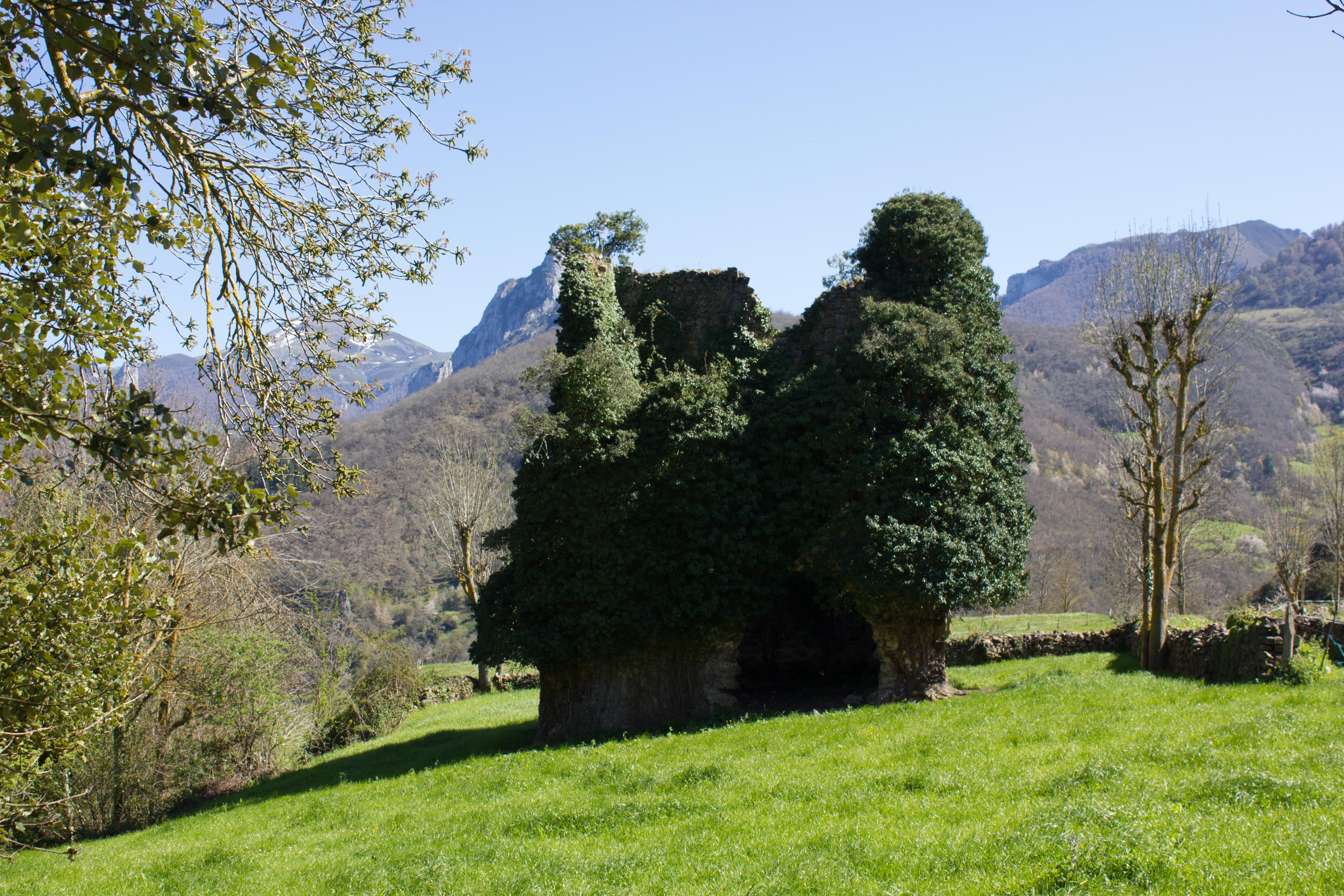 Una de las torres de Campo.